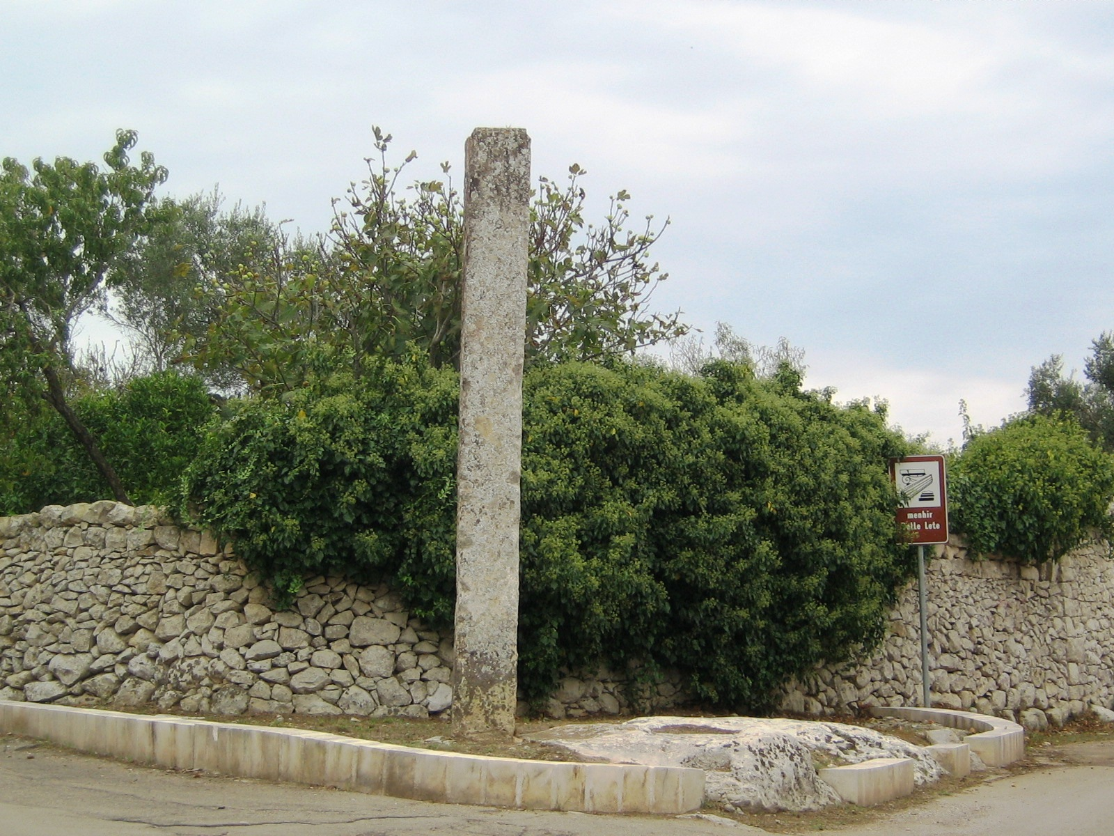 Menhir della Lete Galugnano, Lecce